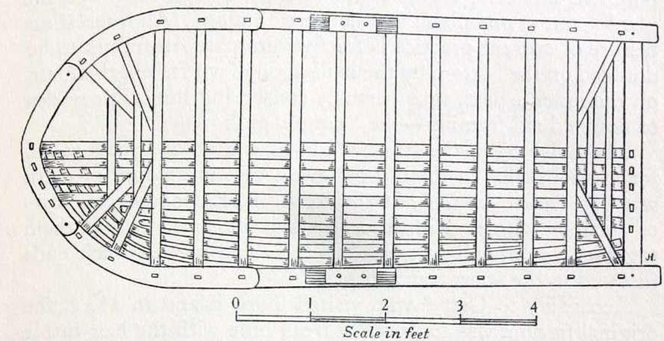 Теоретический чертёж малого курраха гребкового типа, применяемого в Банбеге(округ Роззес) и на острове Тори